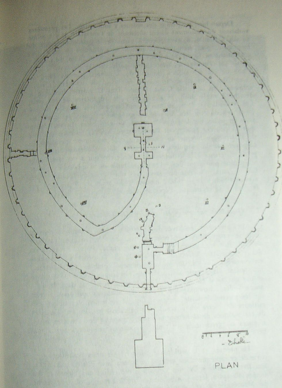 Plan du Mausolée Royal de Maurétanie